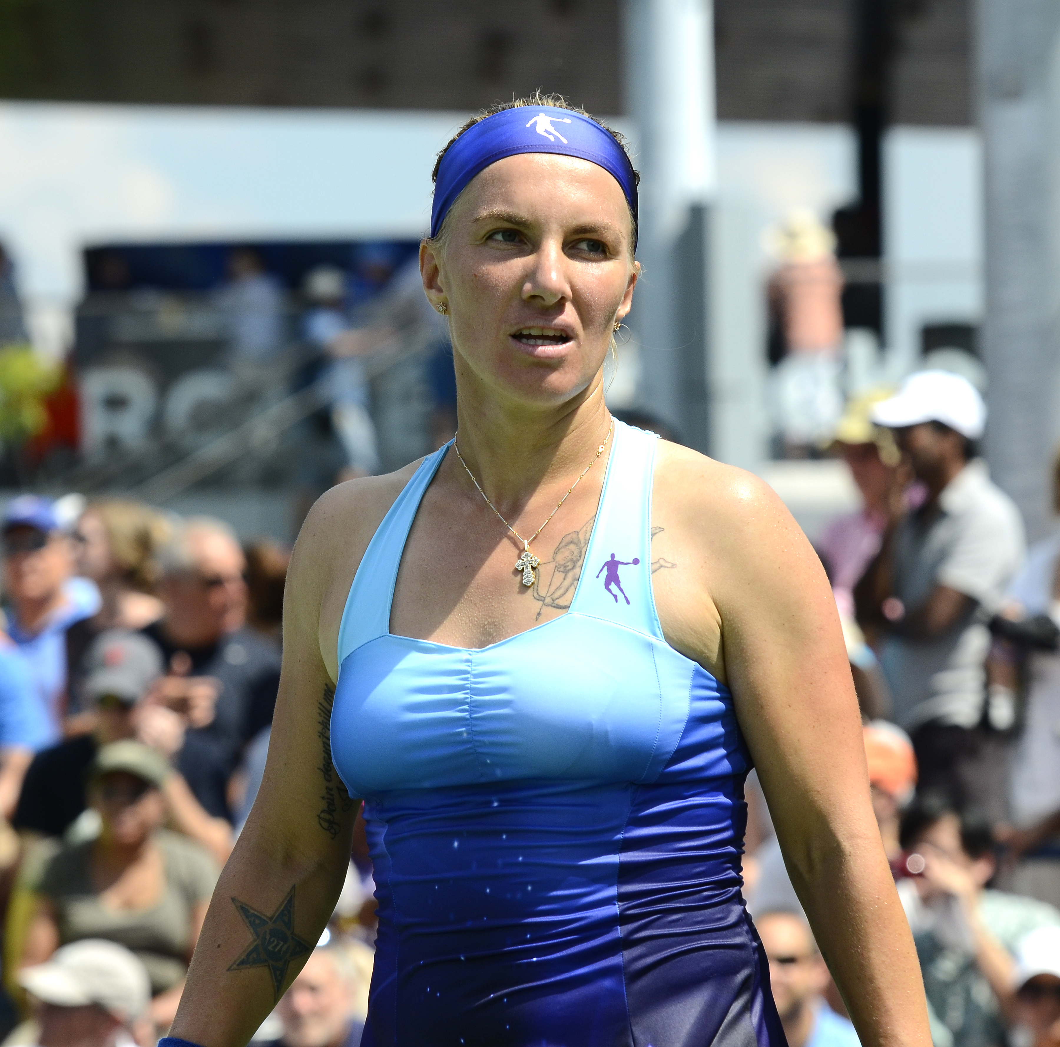 August 26, 2014 Queens, NY Marina Erakovic (NZL) def. Svetlana Kuznetsova (RUS)